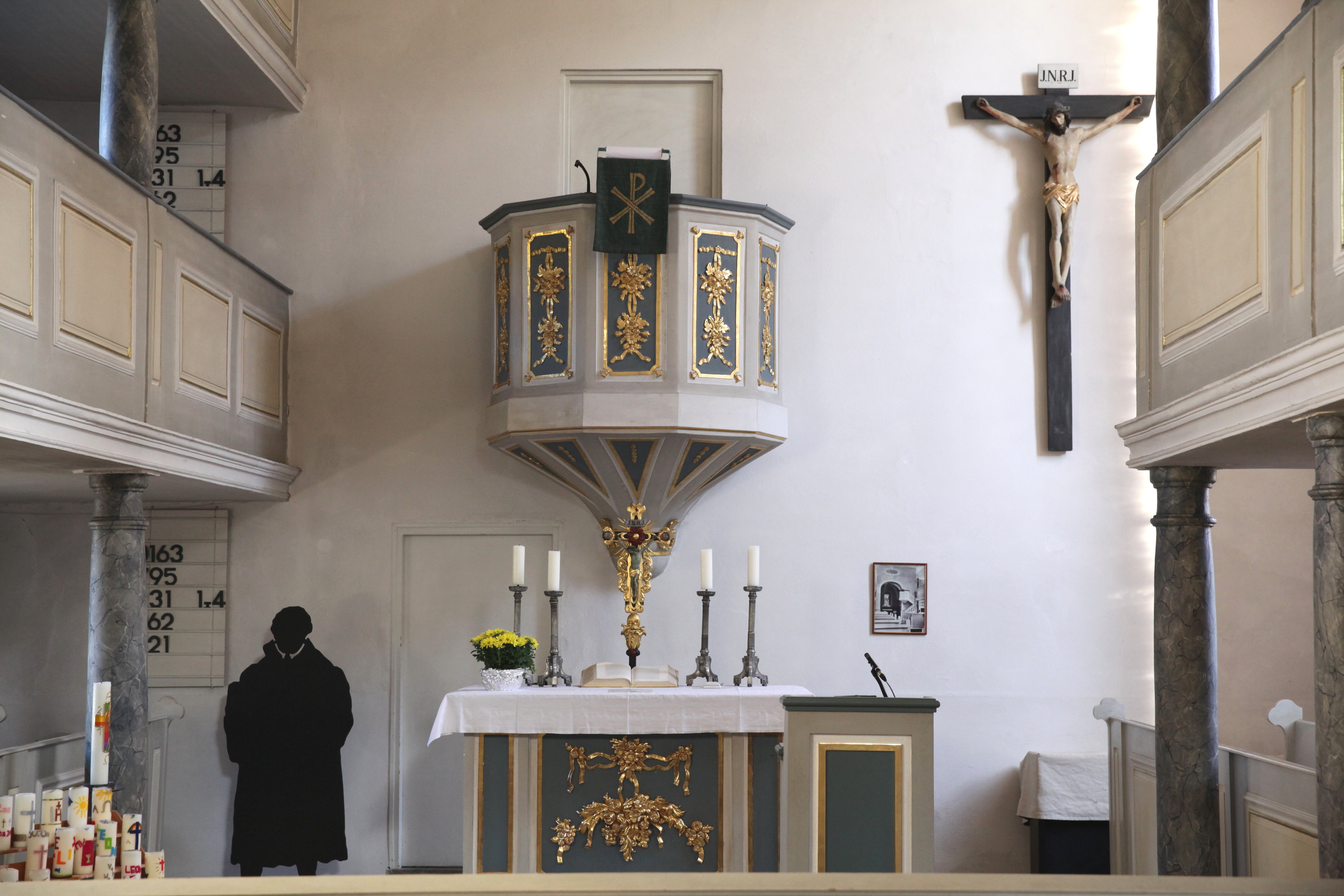 St. Matthäus, Neuses bei Coburg